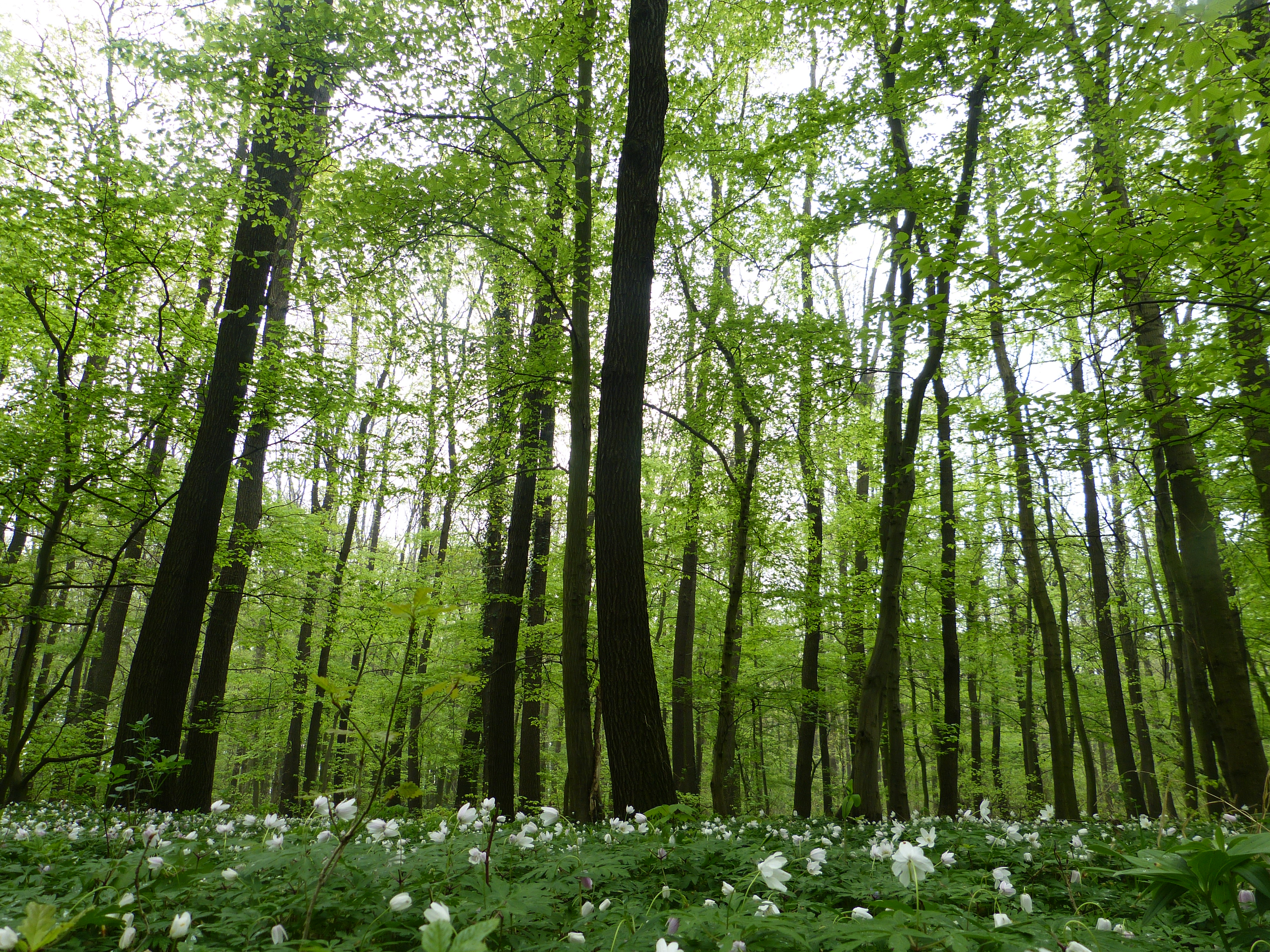 Buschwindröschen im NSG Bergholz